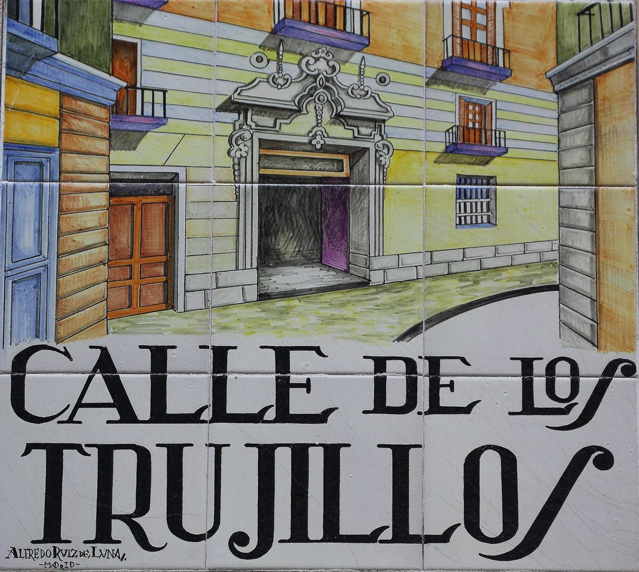 Rótulo de azulejo